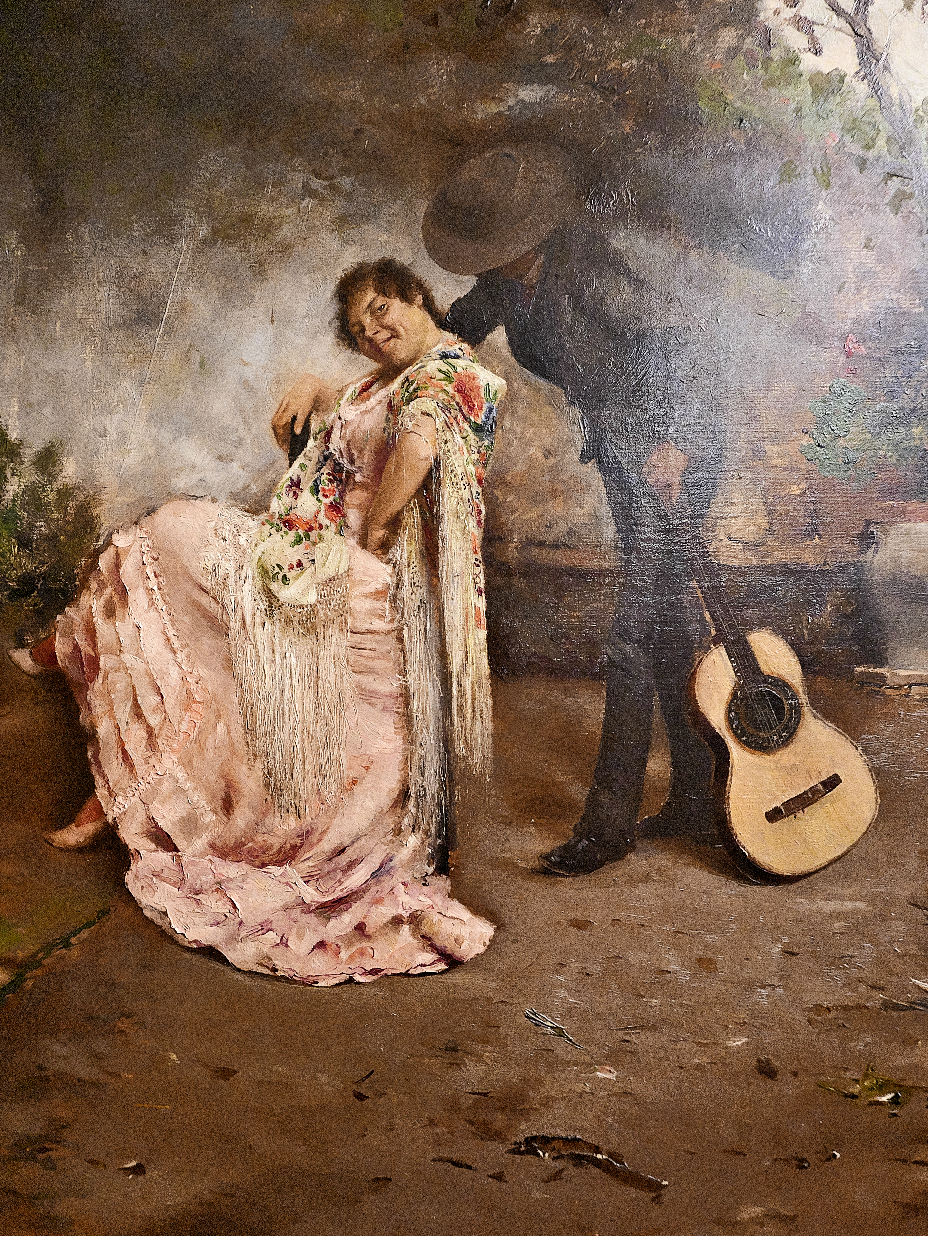 Detalle de la pintura de Juan Bautista de Guzman Orantes (1879)